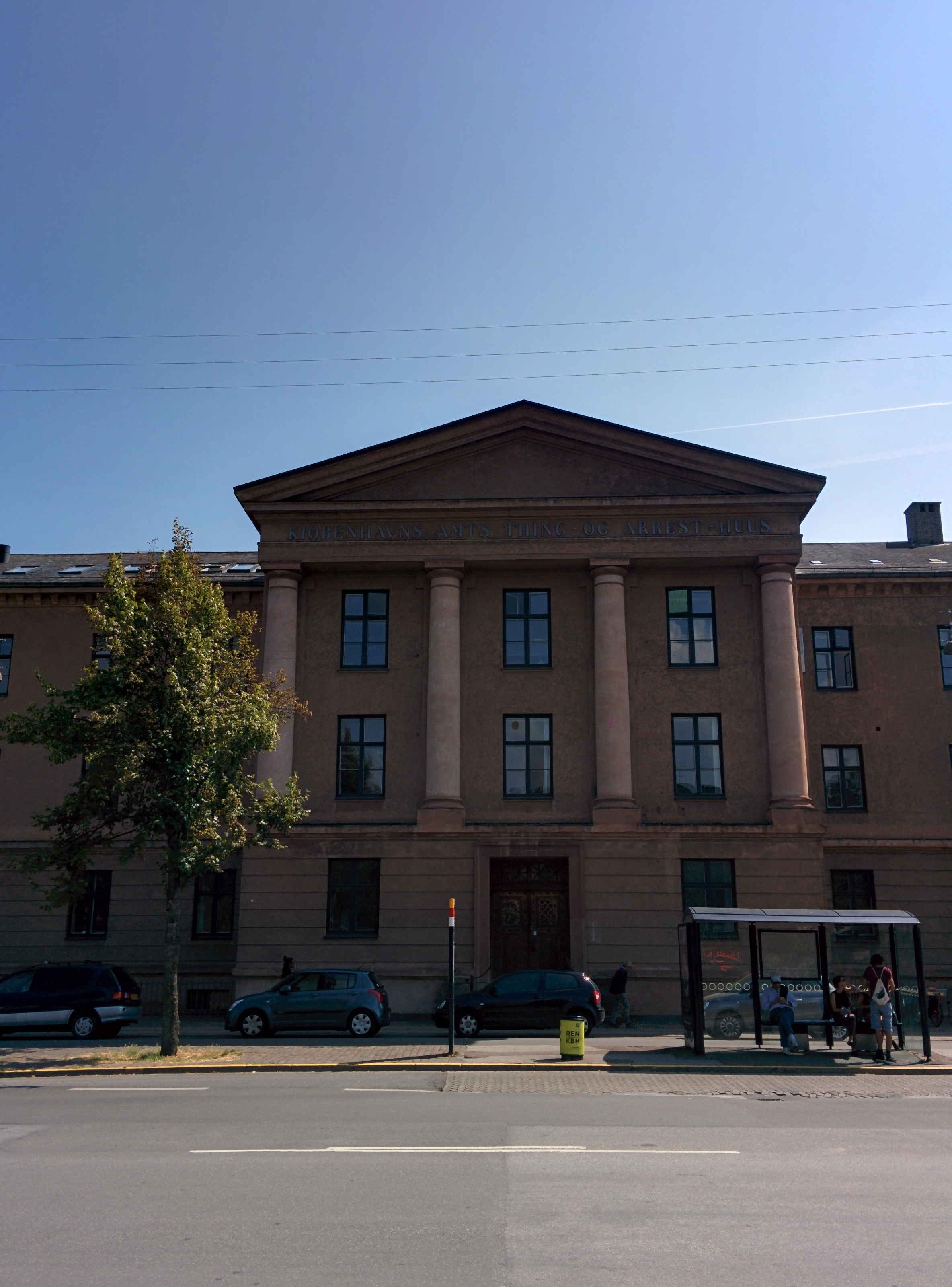 Blegdamsvejens Fængsel, Blegdamsvej, København. På bygningen står "Kjøbenhavns amts thing- og arreet-hus"